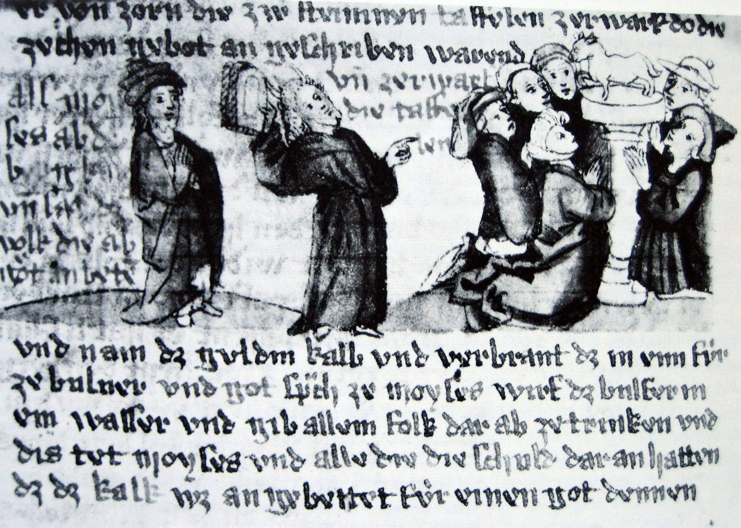 illustrierte Pergamenthandschrift aus dem Frauenkloster Oetenbach; ca. 1455 -1460. Inhalt: Als Moyses ab dem berg kam unf sach, dz volk die abgoet anbeten, und zerwarf die taffelen